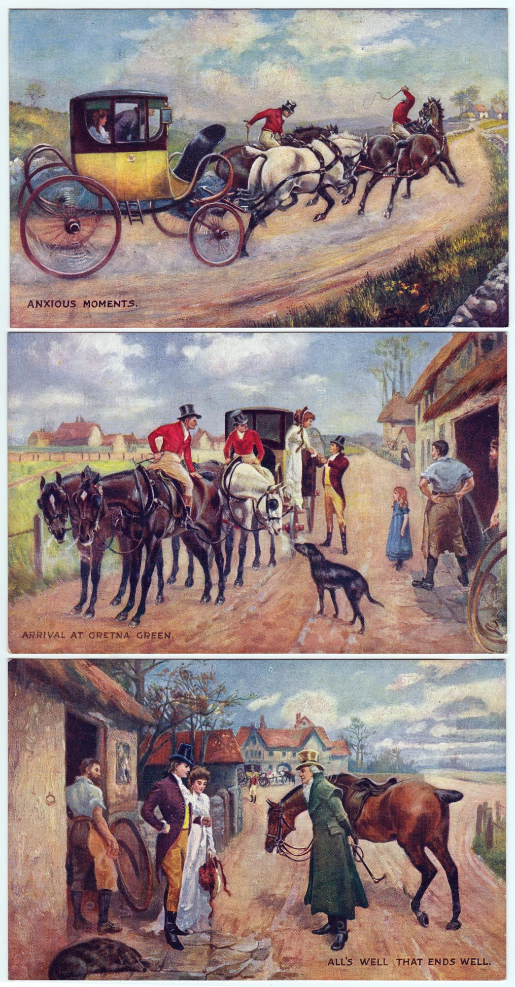 Gretna Green, trois cartes postales illustrées (d’une série de 4) représentant les épisodes d'un mariage à Gretna Green : (Le Départ) ; Moments d'angoisse ; Arrivée à Gretna Green ; Tout est bien qui finit bien. Cartes postales "Oilette" de Raphael Tuck & Sons (1911). Non signé, peintre inconnu.